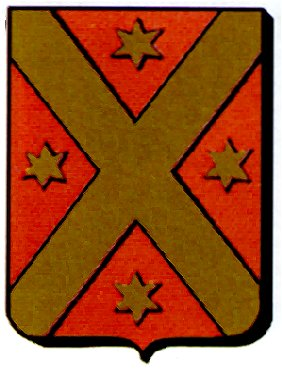 Stemma della nobile famiglia Manno.